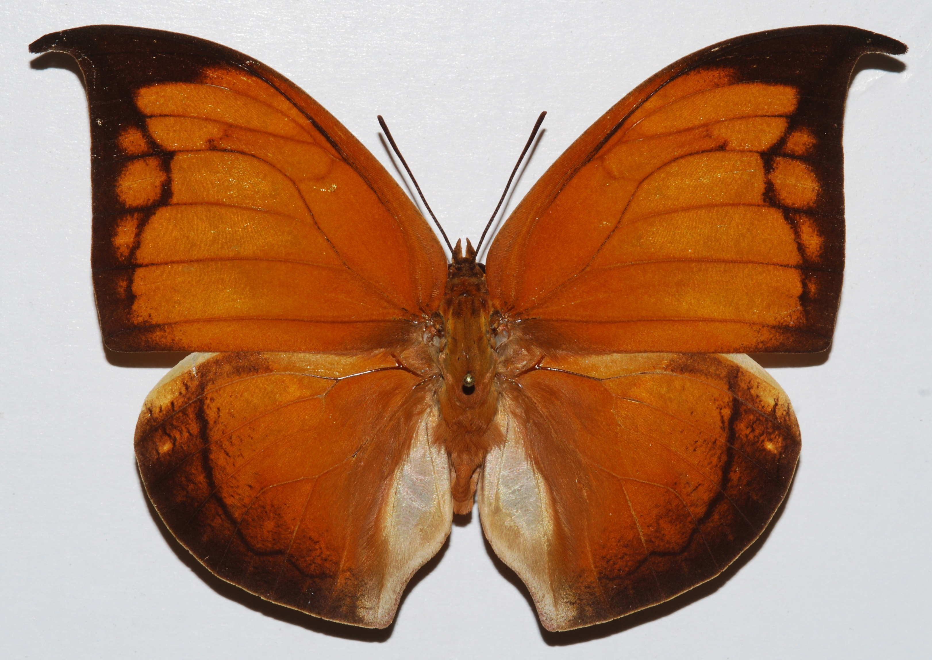 Satipo, PERU